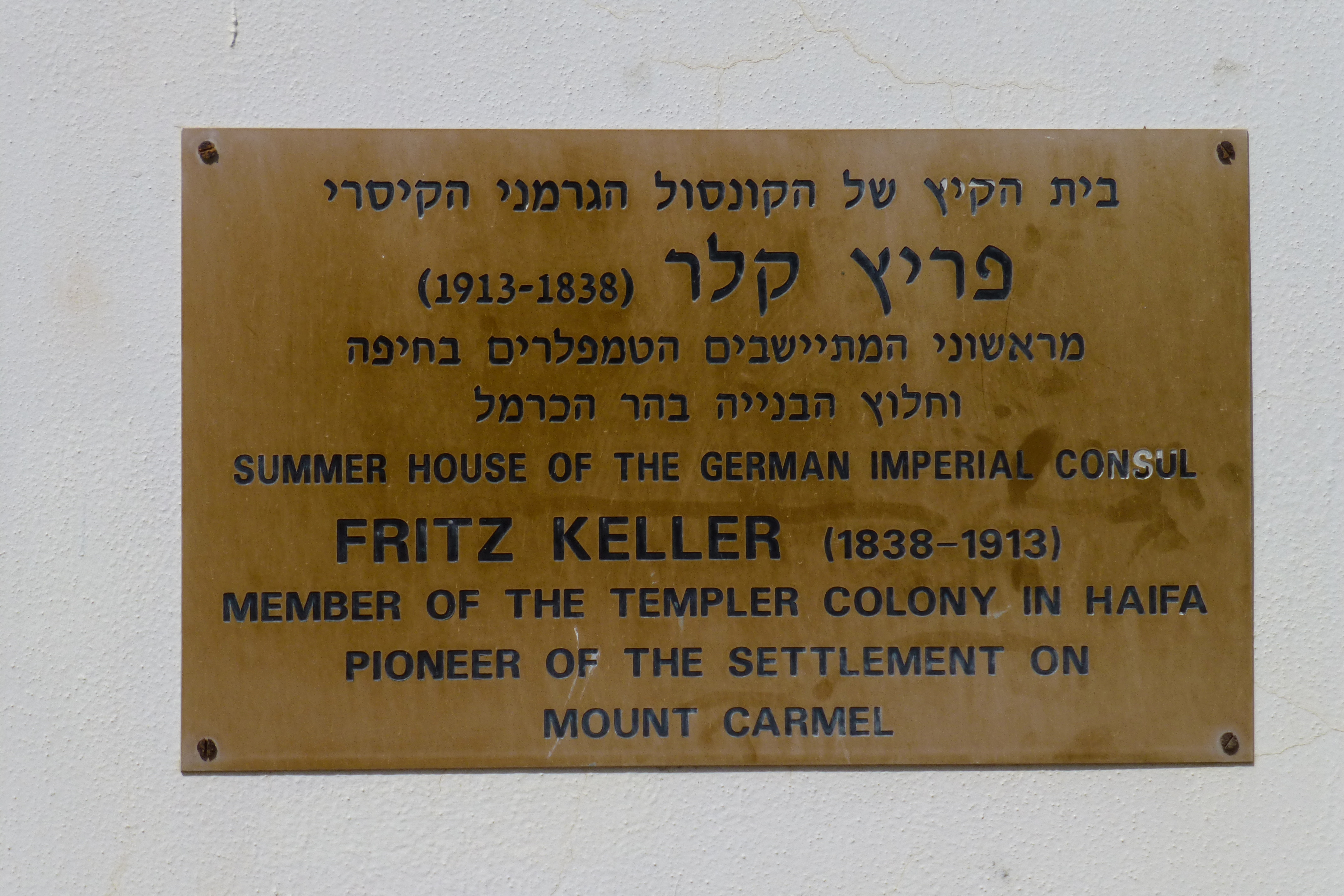 בית קלר - Beit Keler רח' קלר 2, מרכז הכרמל, חיפה שלט הסבר על הבית